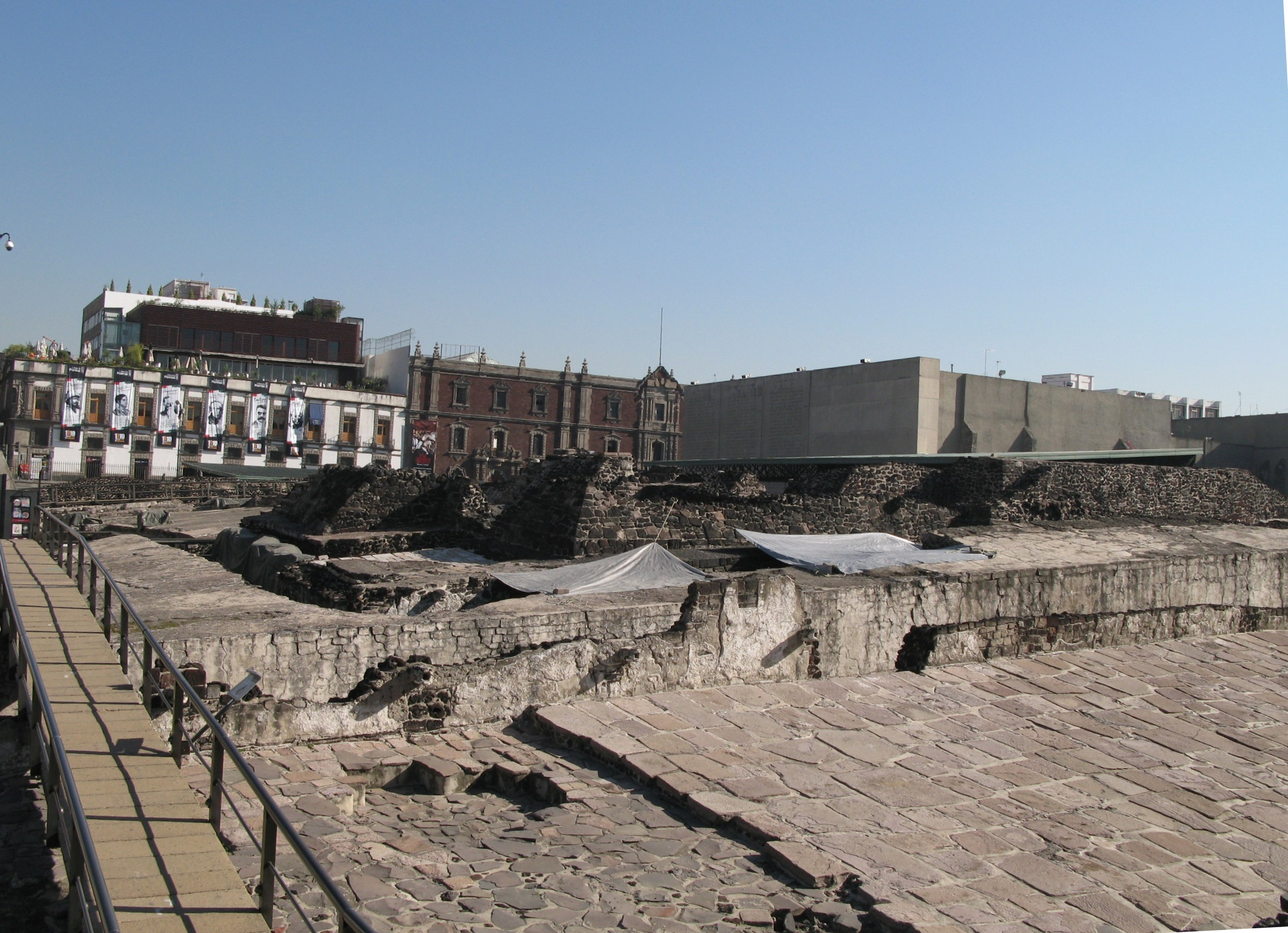 Arheološki ostanki Tenochtitlana, Ciudad de Mexico, Mehika.